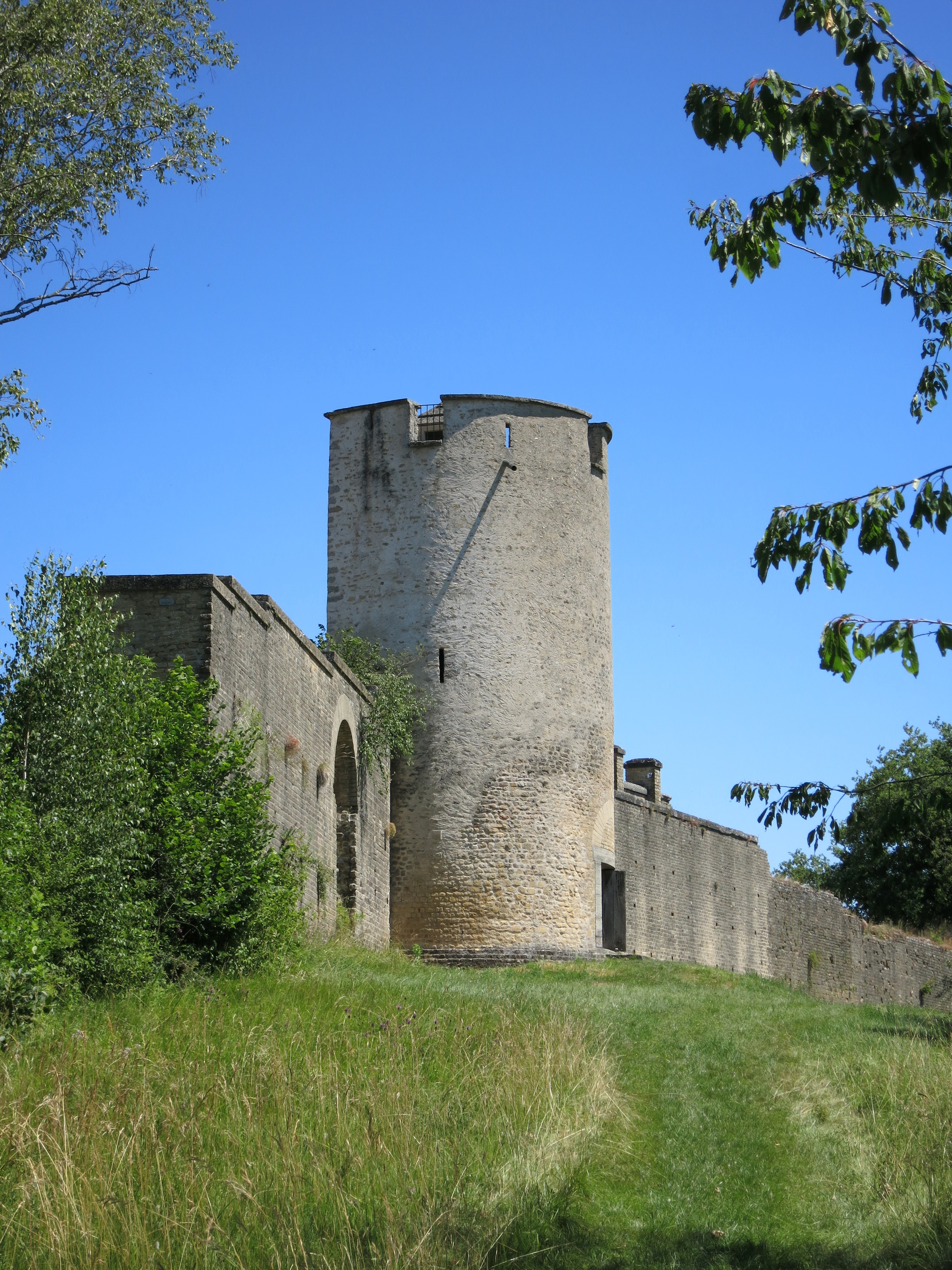 La Tornallaz